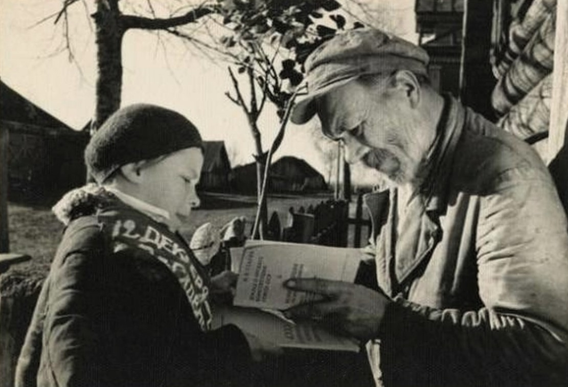 Перед выборами в колхозе